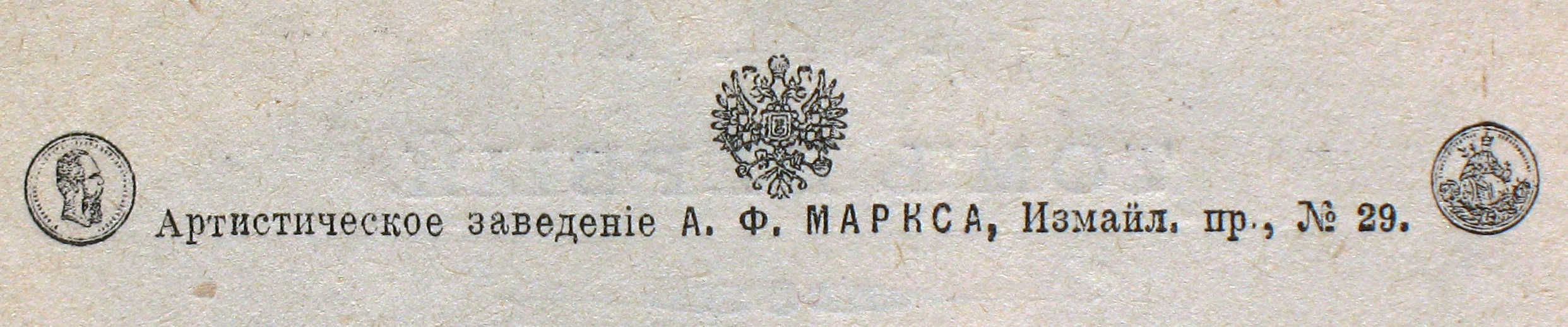 Фирменный знак артистического заведения (фотоателье) издательства А.Ф. Маркс, СПб, где выполнялись портреты известных людей для помещения в журнал Нива и издаваемые книги.